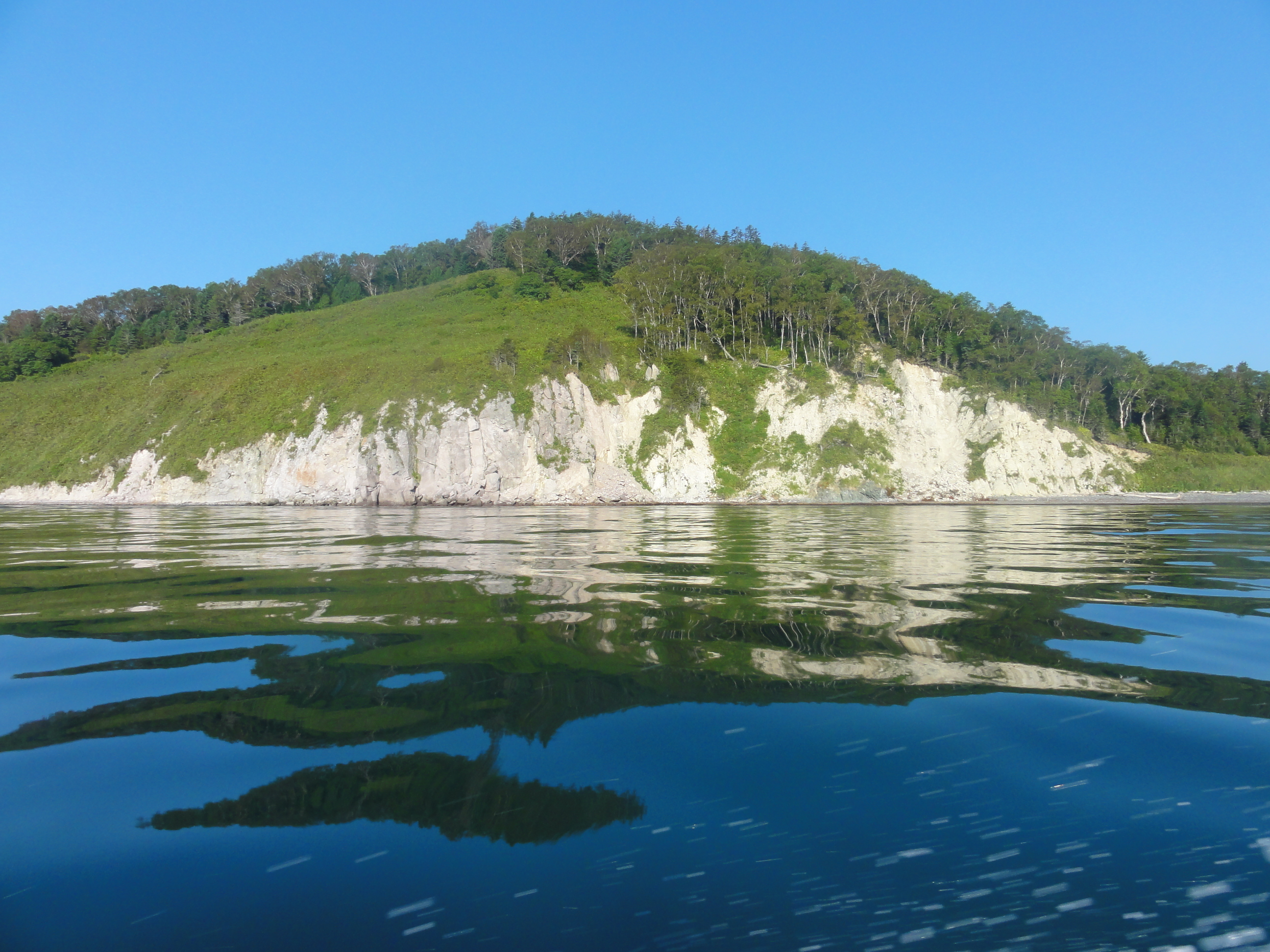 Coast between Nel'ma and Grossevichy